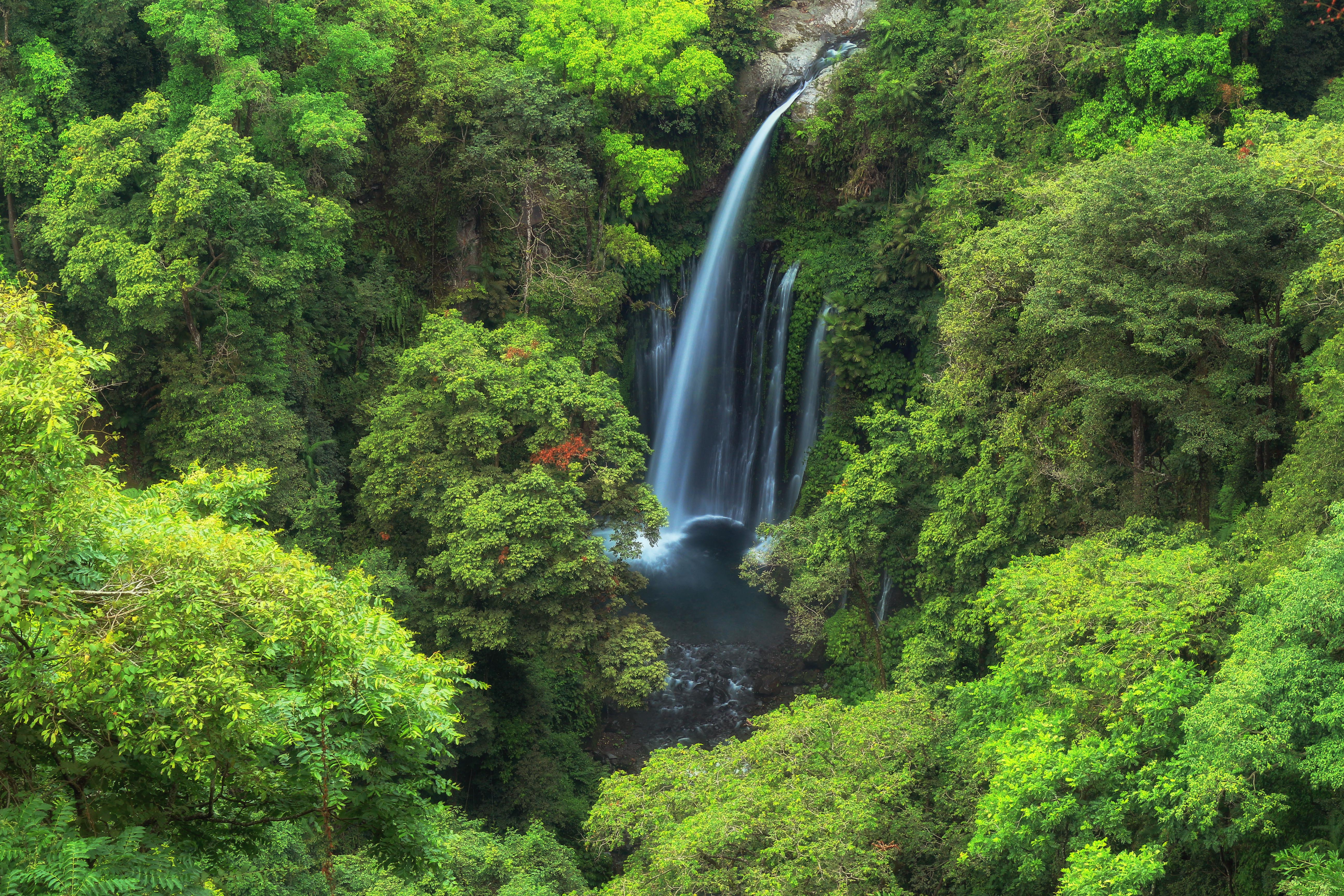 Tiu Kelep Adalah sebuah Air terjun yang berada di kaki Gunung Rinjani, hutan sekitar lokasi Tiu Kelep merupakan hutan penyangga air, yang terdiri dari kawasan taman nasional gunung Rinjani dan kawasan hutan adat Mandala.. Yon Illahi .